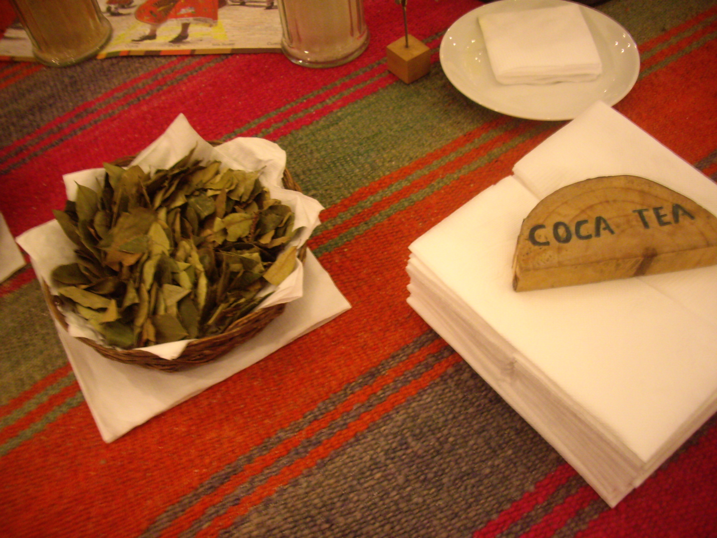 Té de coca o mate de coca, utilitzat per combatre el mal d'alçada